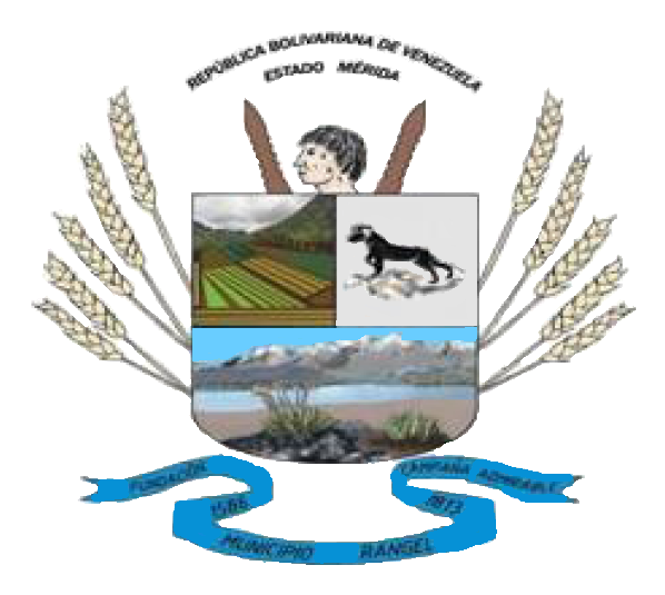 Escudo del municipio Rangel, Estado Mérida, Venezuela